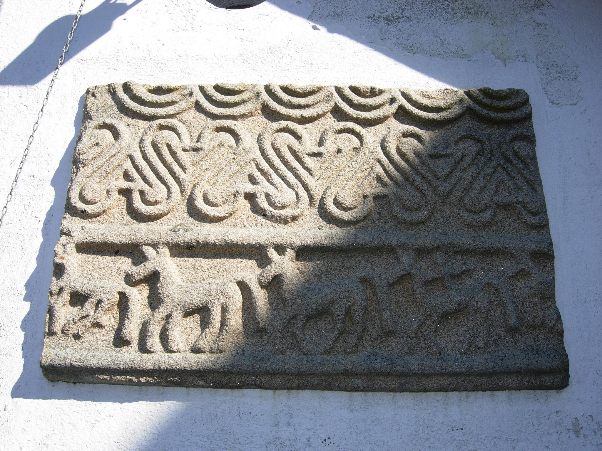 Capela de Formigueiro. Amoeiro. Relevo prerromano reutilizado